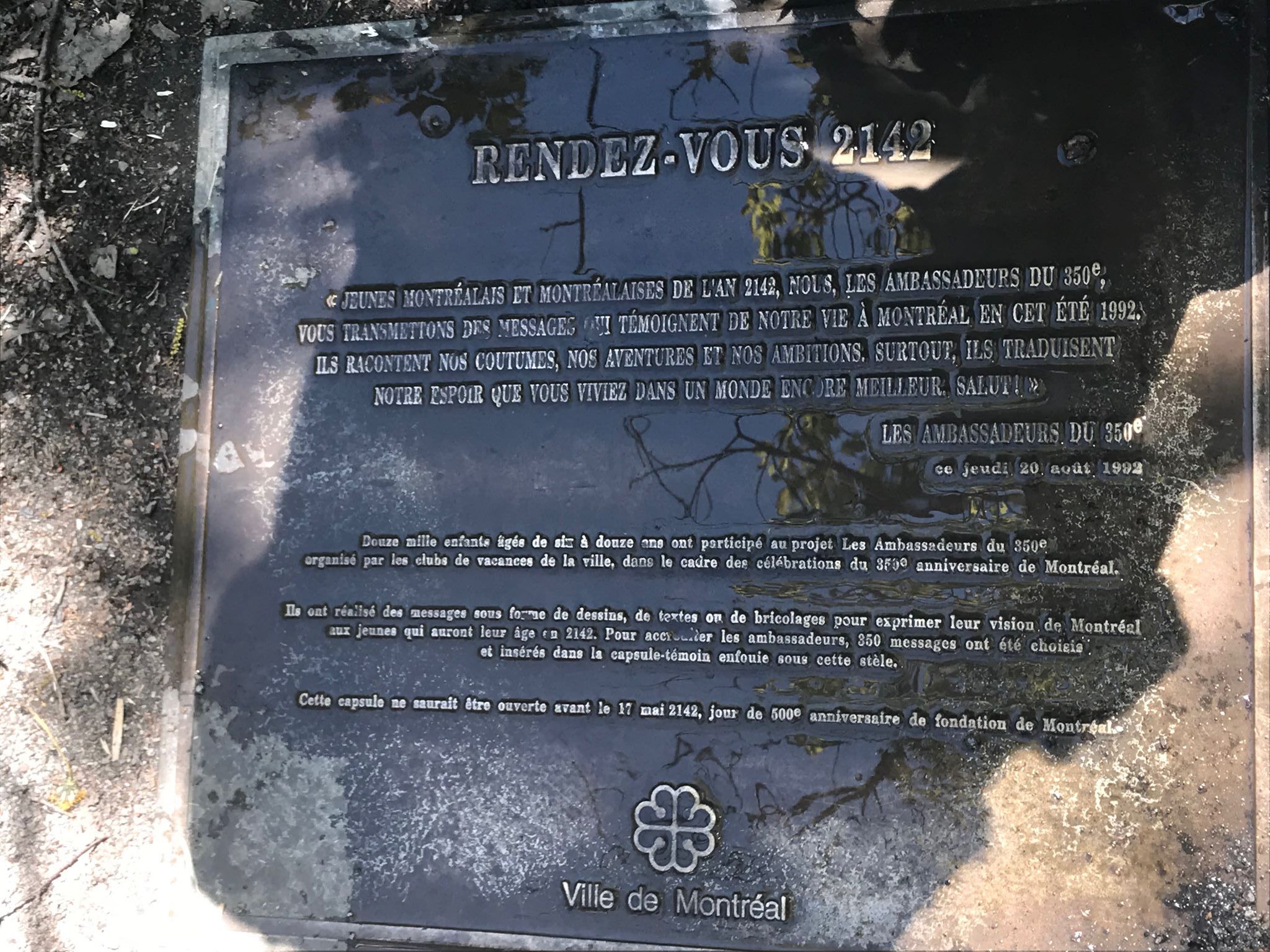 Plaque placée au pied de la croix du mont Royal (Montréal) indiquant l'emplacement d'une capsule du temps destinée à n'être ouverte que le 17 mai 2142 jour du 500e anniversaire de la fondation de Montréal.